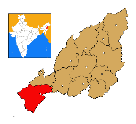 Mapa de localización del distrito